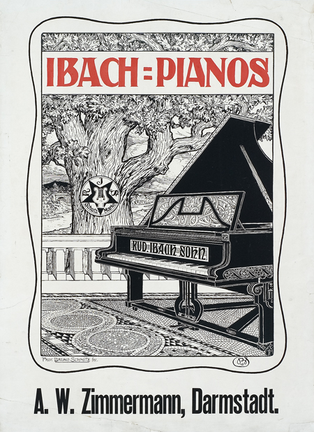 Plakat als Zweifarb-Druck in den Maßen circa 88,8 x 64,7 cm, gedruckt von der Graphischen Kunst (-anstalt Hyll & Klein), Barmen nach einem Entwurf von Bruno Schmitz für den Klavierhersteller Rud. Ibach Sohn. Dargestellt ist ein offener Konzertflügel auf einer Veranda, im Hintergrund eine Eiche mit der Schutzmarke, einer Lyra in einem fünfeckigen, auf der Spitze stehenden Stern innerhalb eines Kreises mit den Buchstaben R, J und S. Am Fuß des Blattes der Zusatz „A. W. Zimmermann, Darmstadt' …“